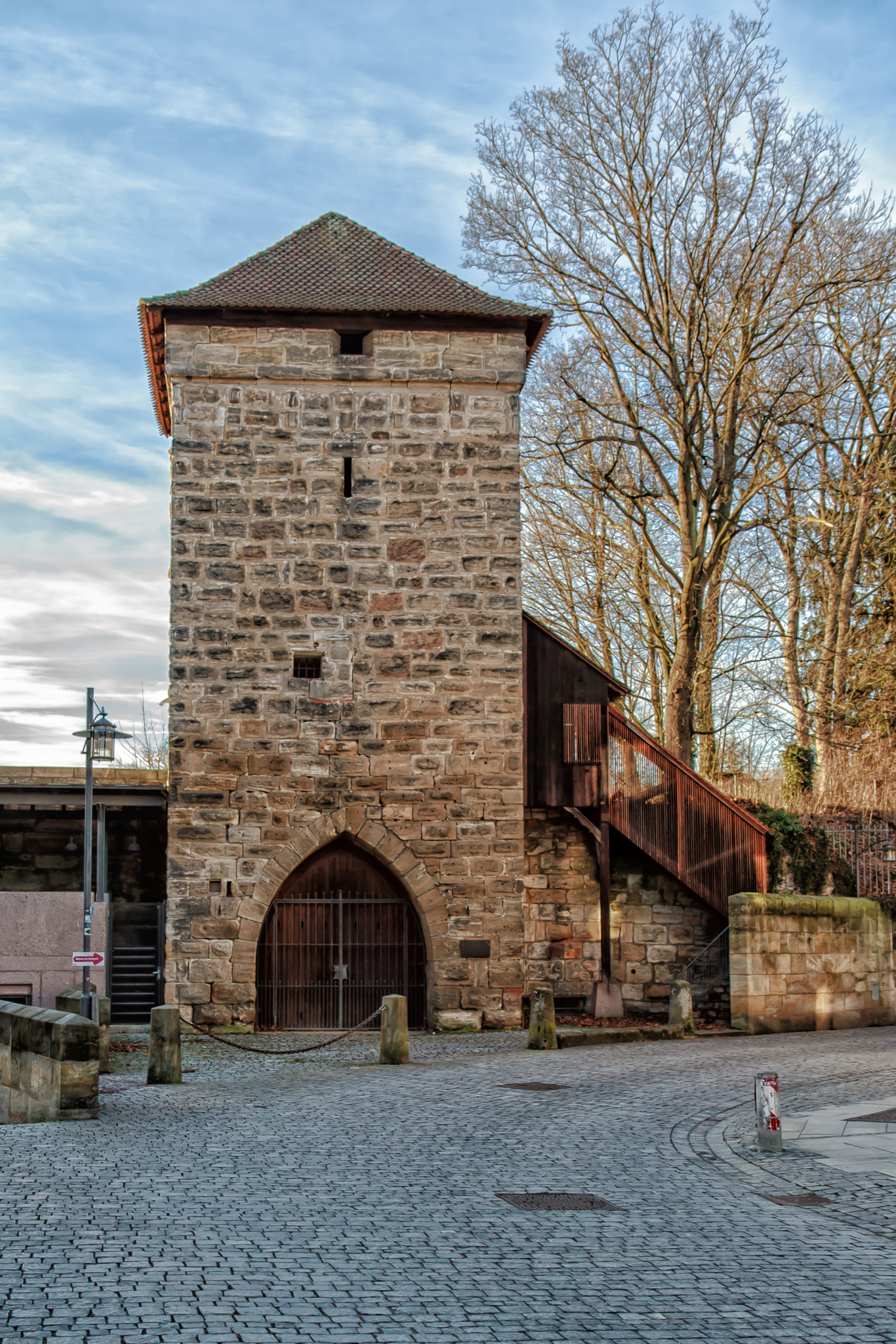 Saltorturm - Forchheim - 2012